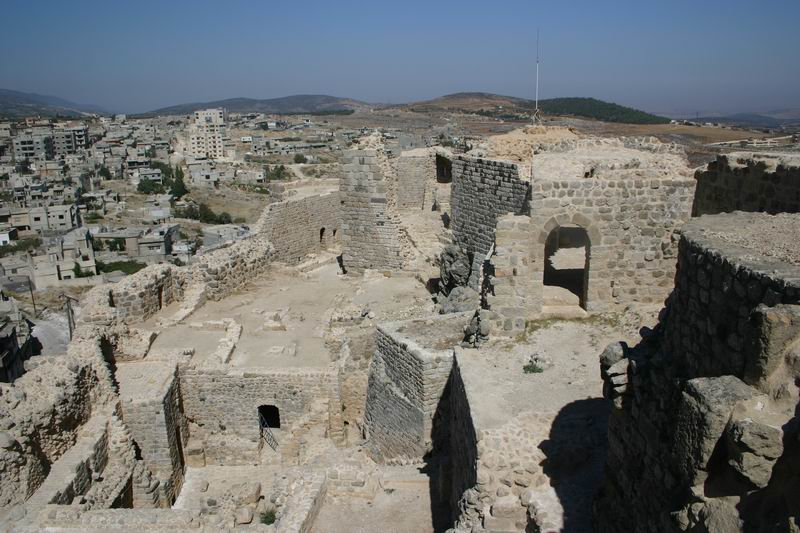 eigenes Foto von 2004, public domain Mewes 13:46, 20. Feb 2005 (CET) Blick über die Kernburg.